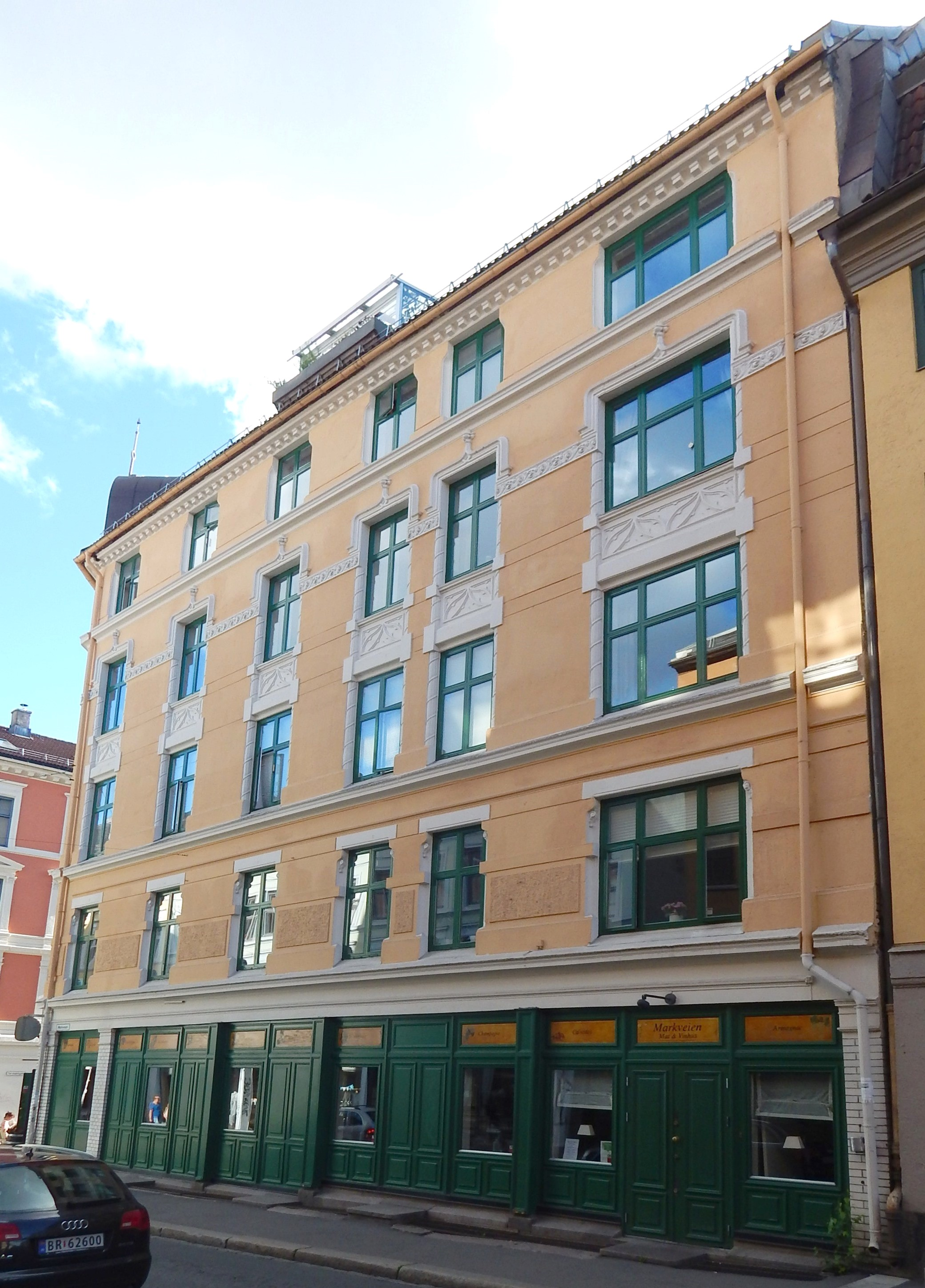 Torvbakkgata 12 med Markveien mat- og vinhus. Arkitekt: Halfdan Strøm (1897–98). Listeført av Byantikvaren i Oslo.